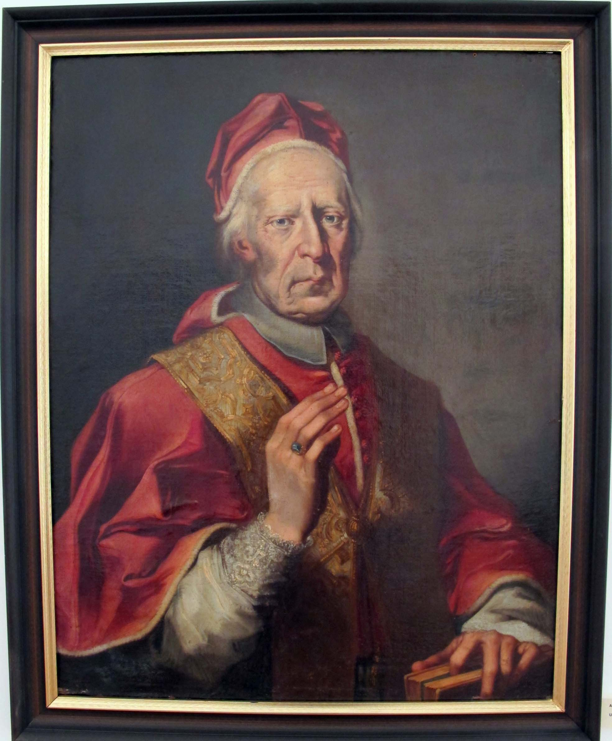 Portrait of Pope Clement XII (1652-1740)